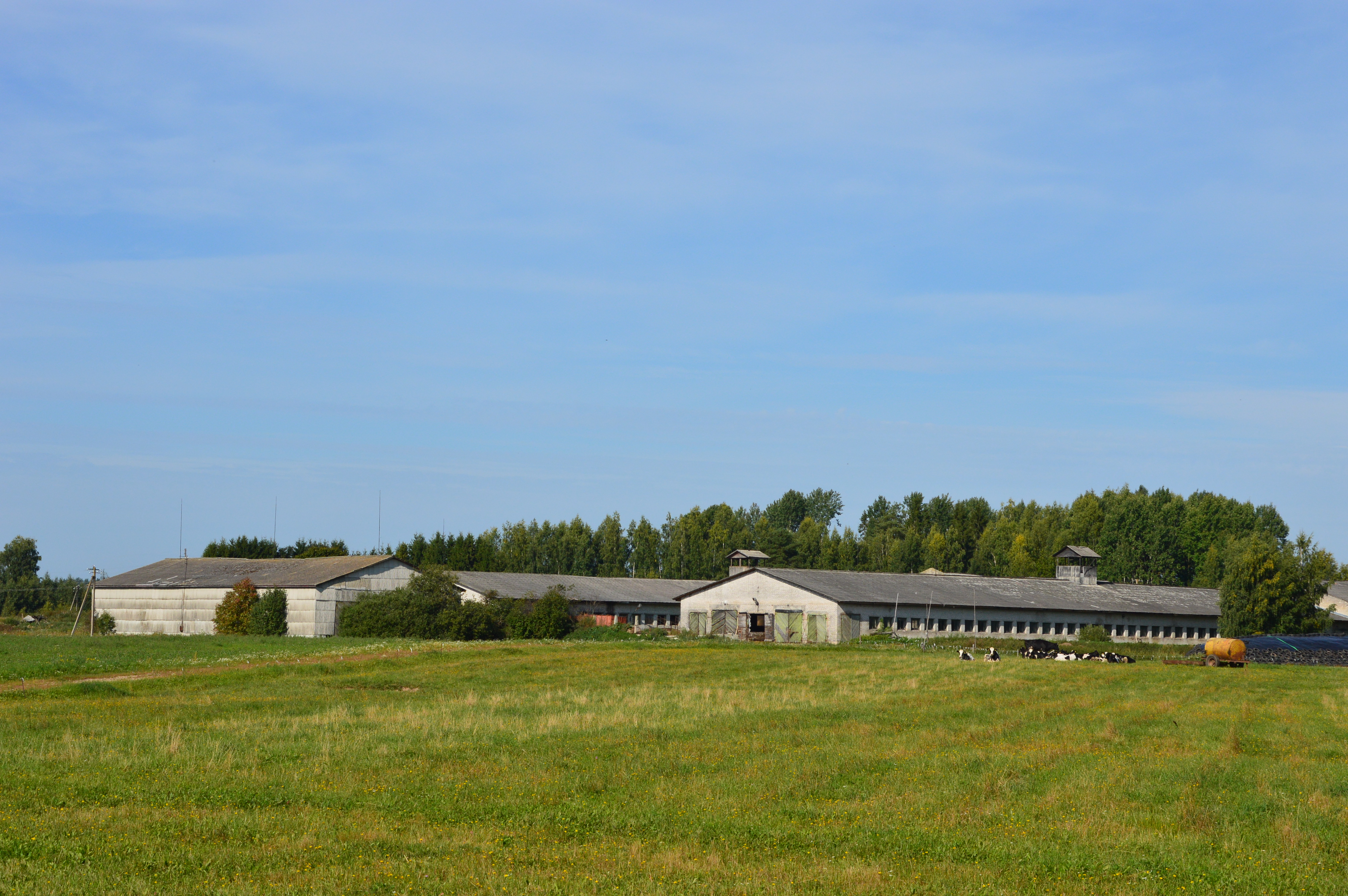 Vagula laudad